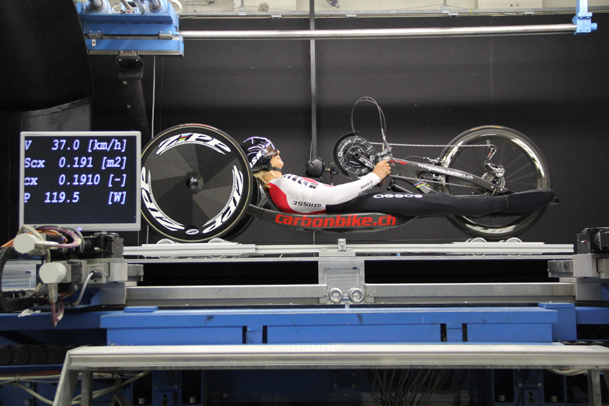 Windkanaltests im Hinblick auf Paralympics 2012